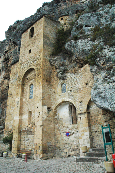 Peyre, Iglesia troglodítica del siglo XI